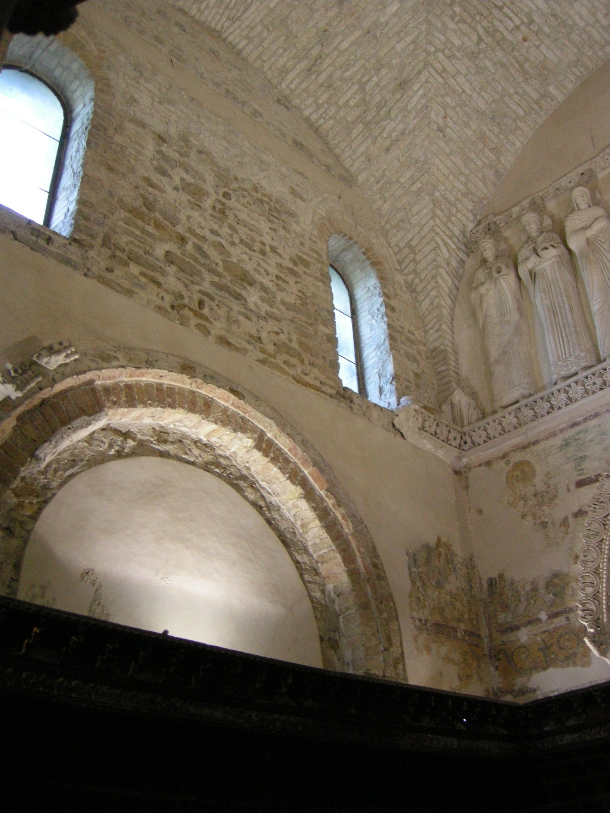 Cividale, tempietto longobardo